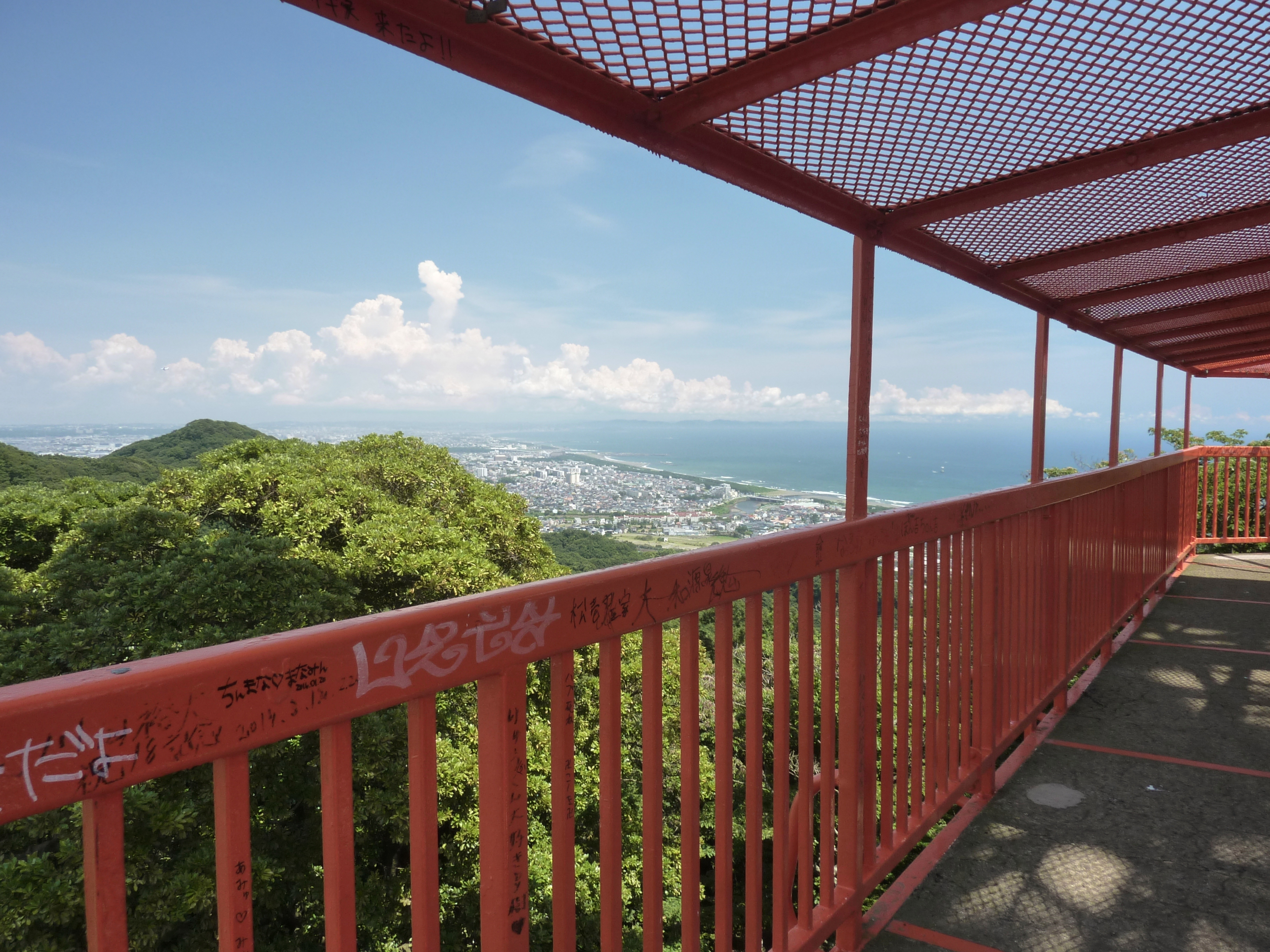 神奈川県平塚市・大磯町。湘南平のテレビ塔展望台下段から相模湾を望む。